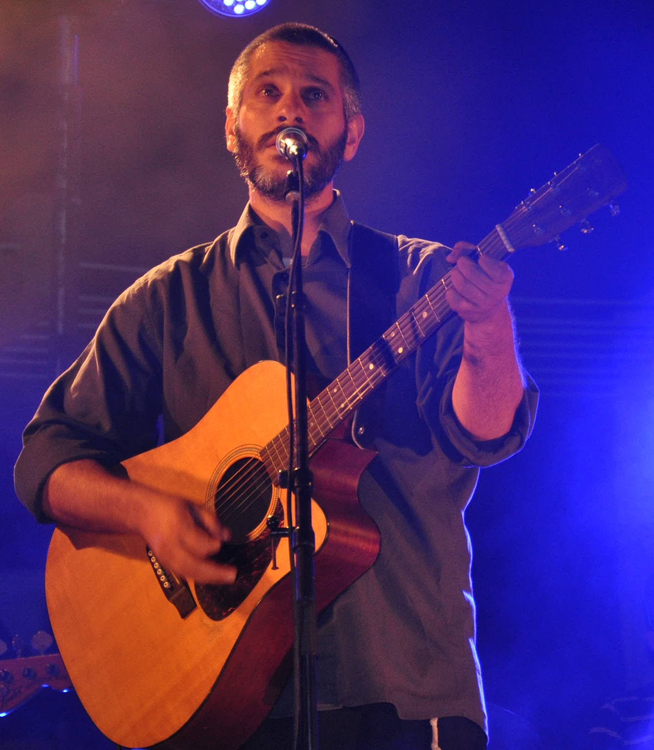 אביתר בנאי בהופעה באמפי ביער יתיר